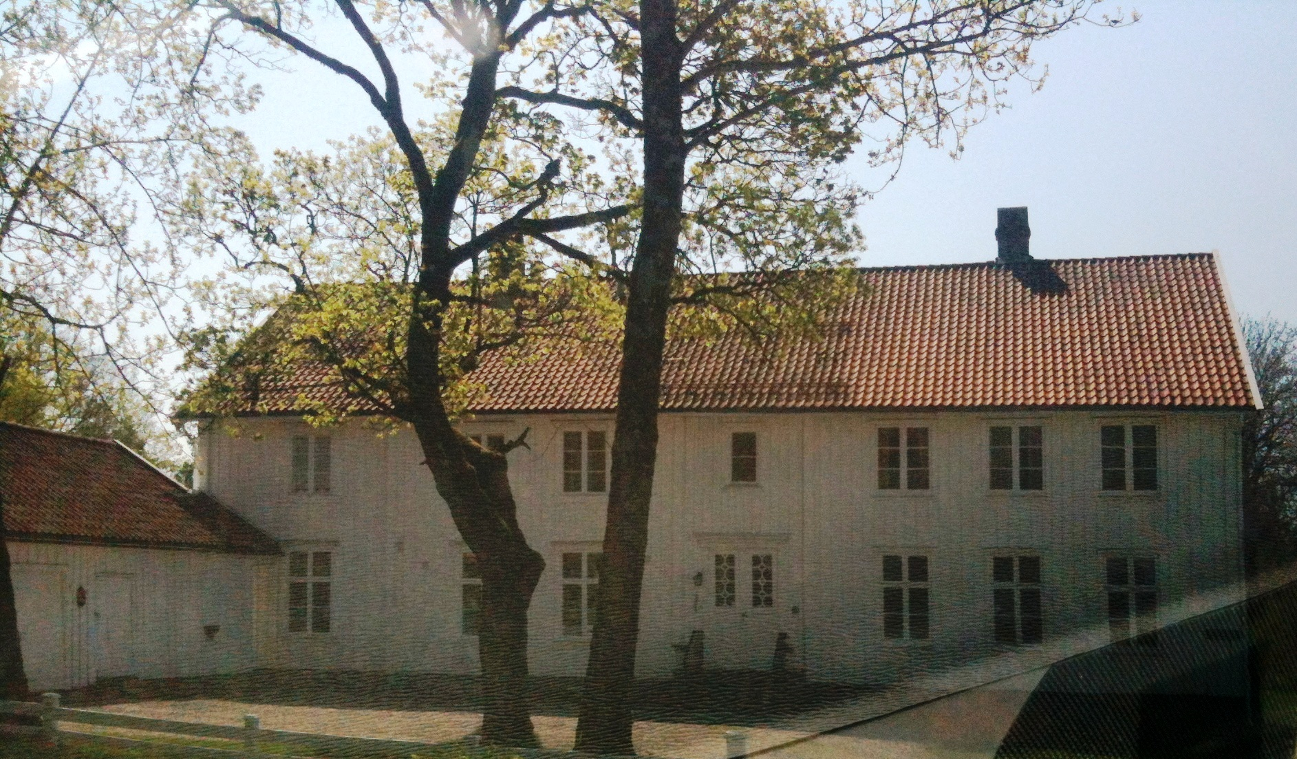 Stokke prestegård, Vestfold